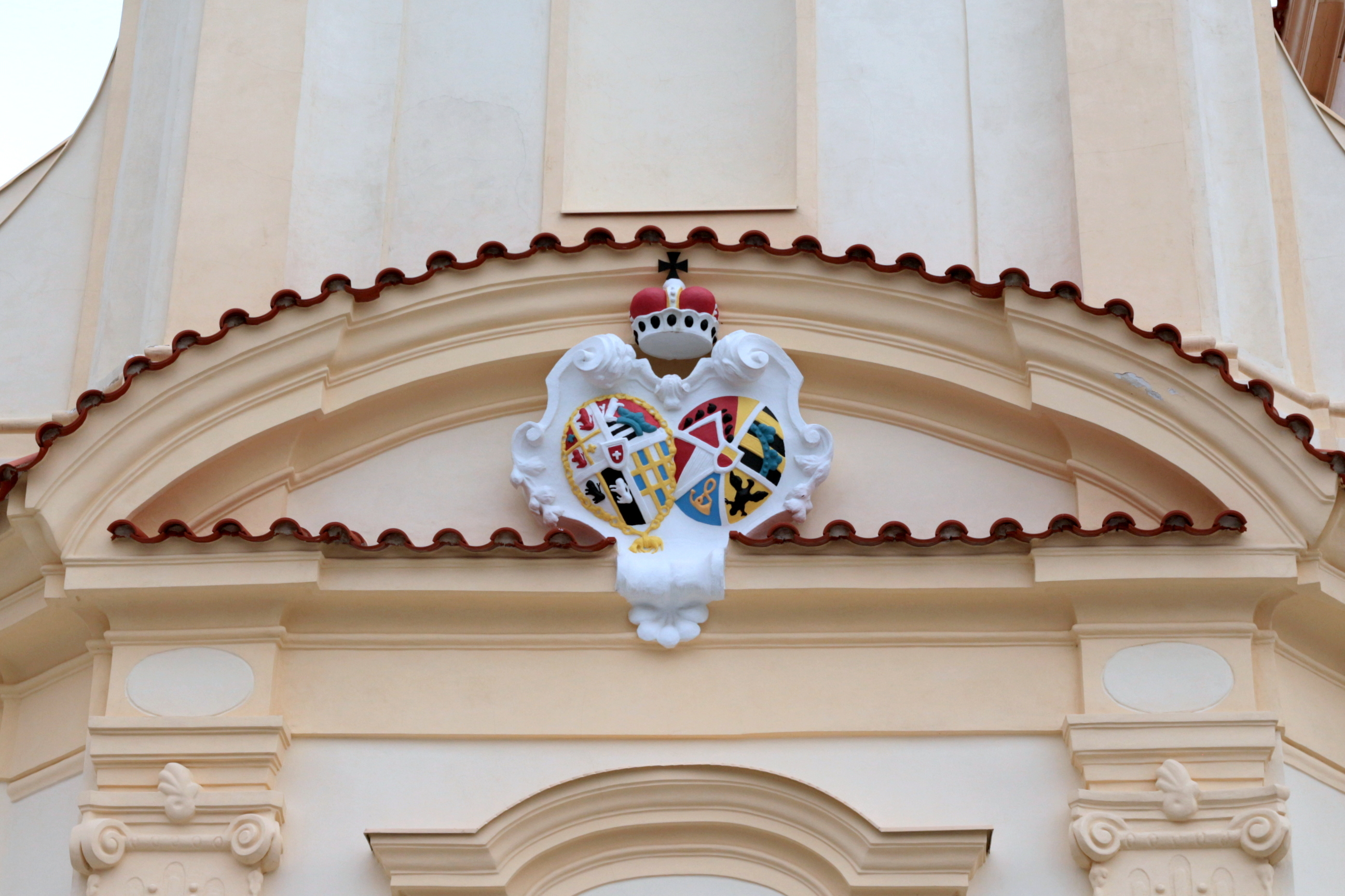 Sluštice